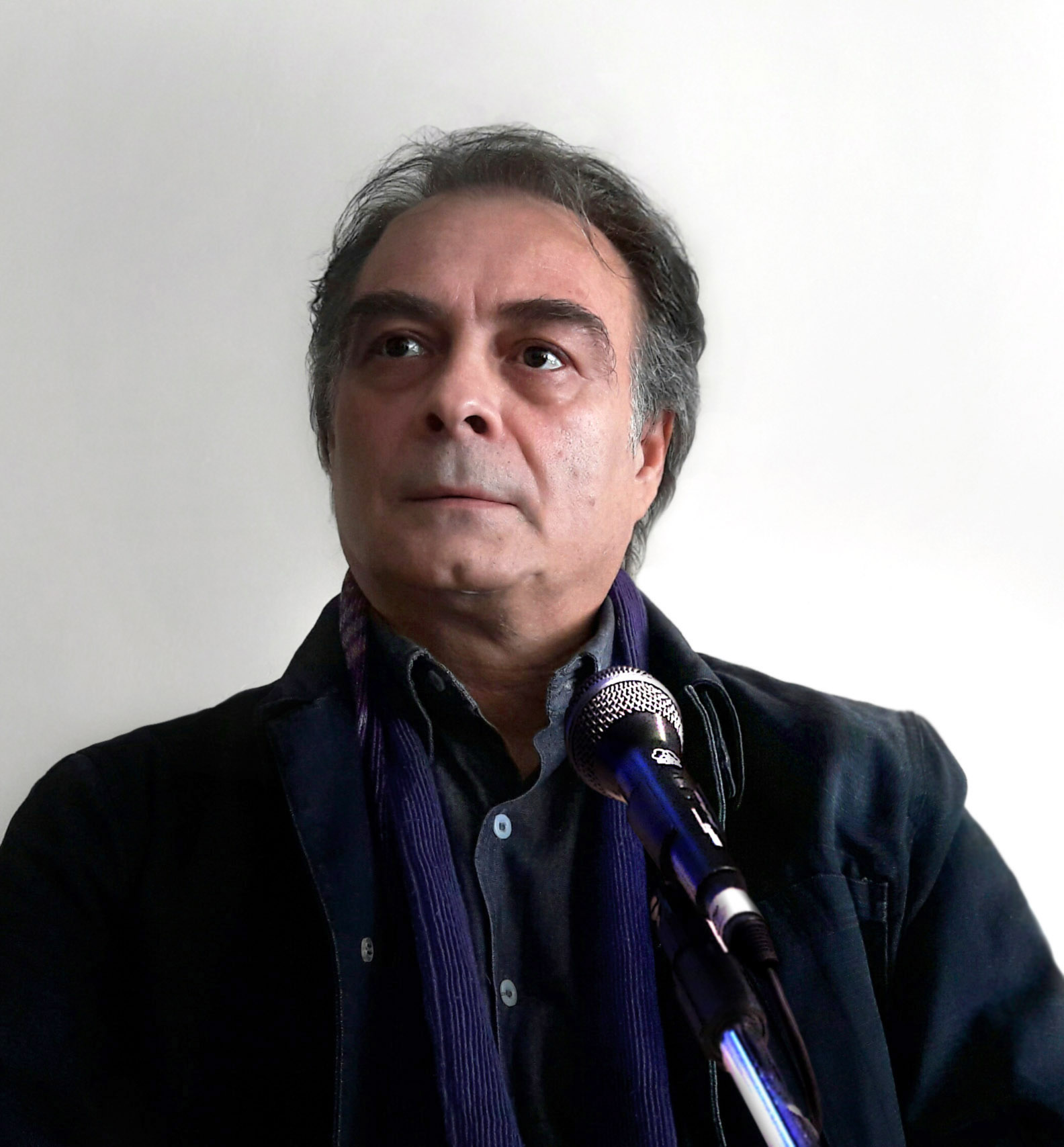 دکتر رضا خدادادی